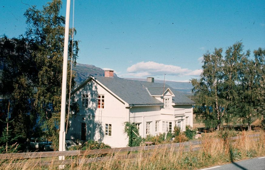 Vang prestegård i Valdres. Ukjent fotograf. Fra Riksantikvarens Kulturminnesøk.